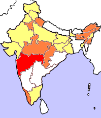 Kartorna bygger på resultat i senaste delstatsval (Juni 2004). Rött betyder att partiet deltar i delstatsregeringen, orange att partiet vann mandat i senaste delstatsvalet och gult att partiet hade lanserat kandidater men utan att vinna mandat. Kartorna tar inte hänsyn till avhopp, partifusioner och fyllnadsval under den ordinarie mandatperiodens gång. Gjord av Soman.